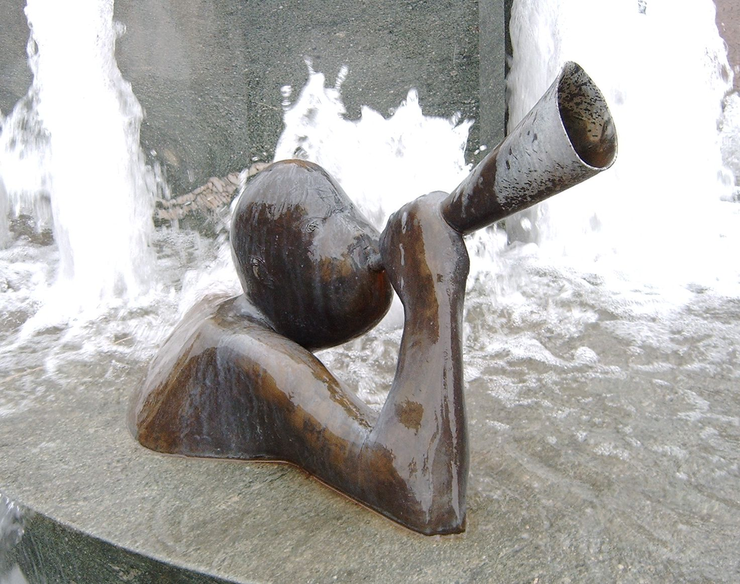 Bremen: Neptunbrunnen von Waldemar Otto